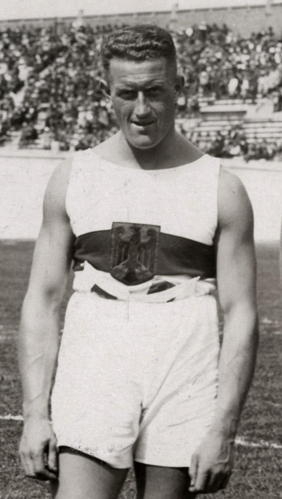 Sport, Olympische Spelen Amsterdam, 1928 : Kogelstoten : Emil Hirschfeld